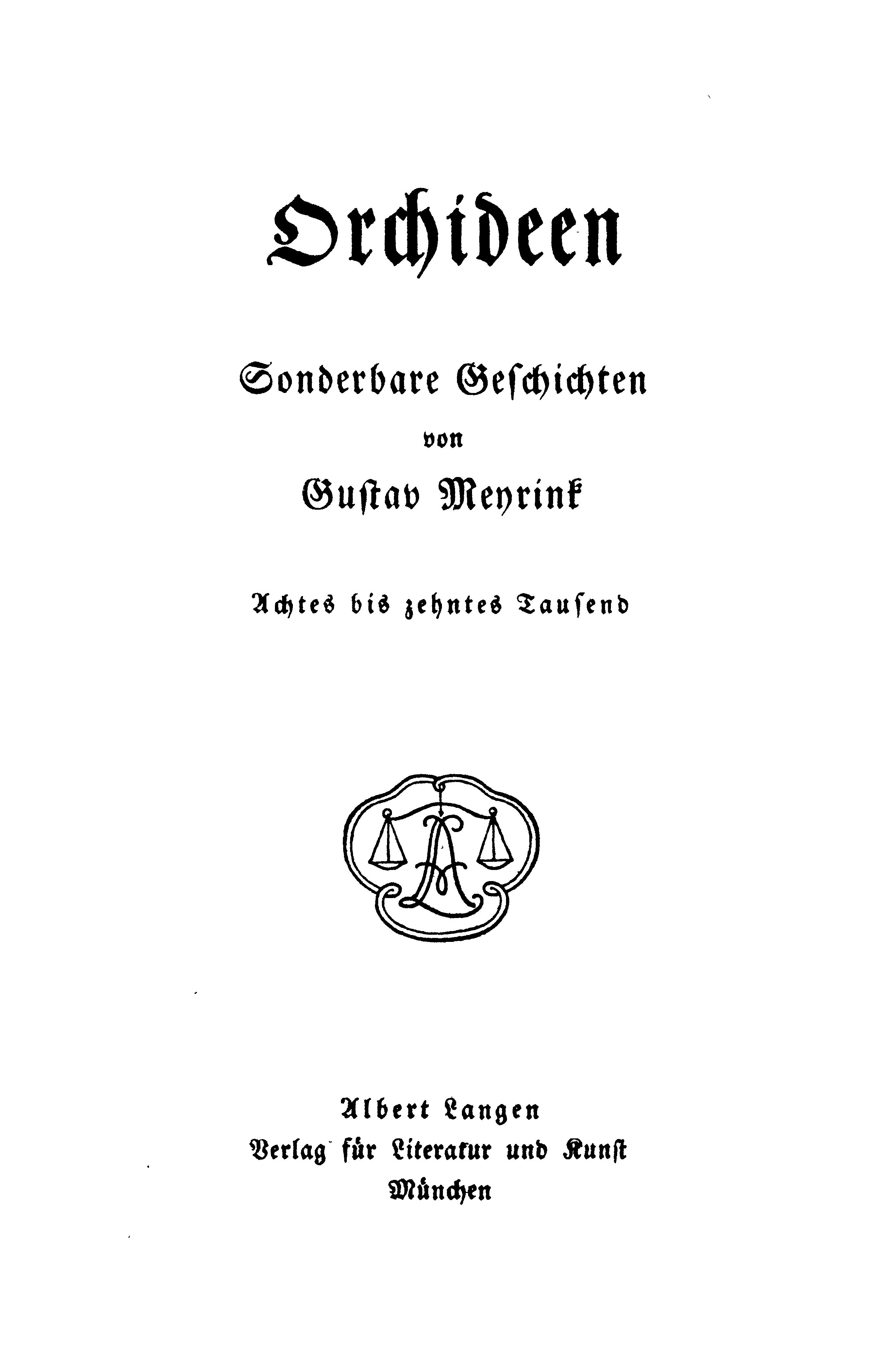 Cover Orchideen 2